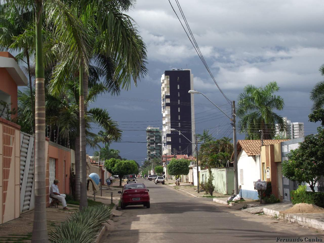 Rua Bahia. Imperatriz Maranhão.